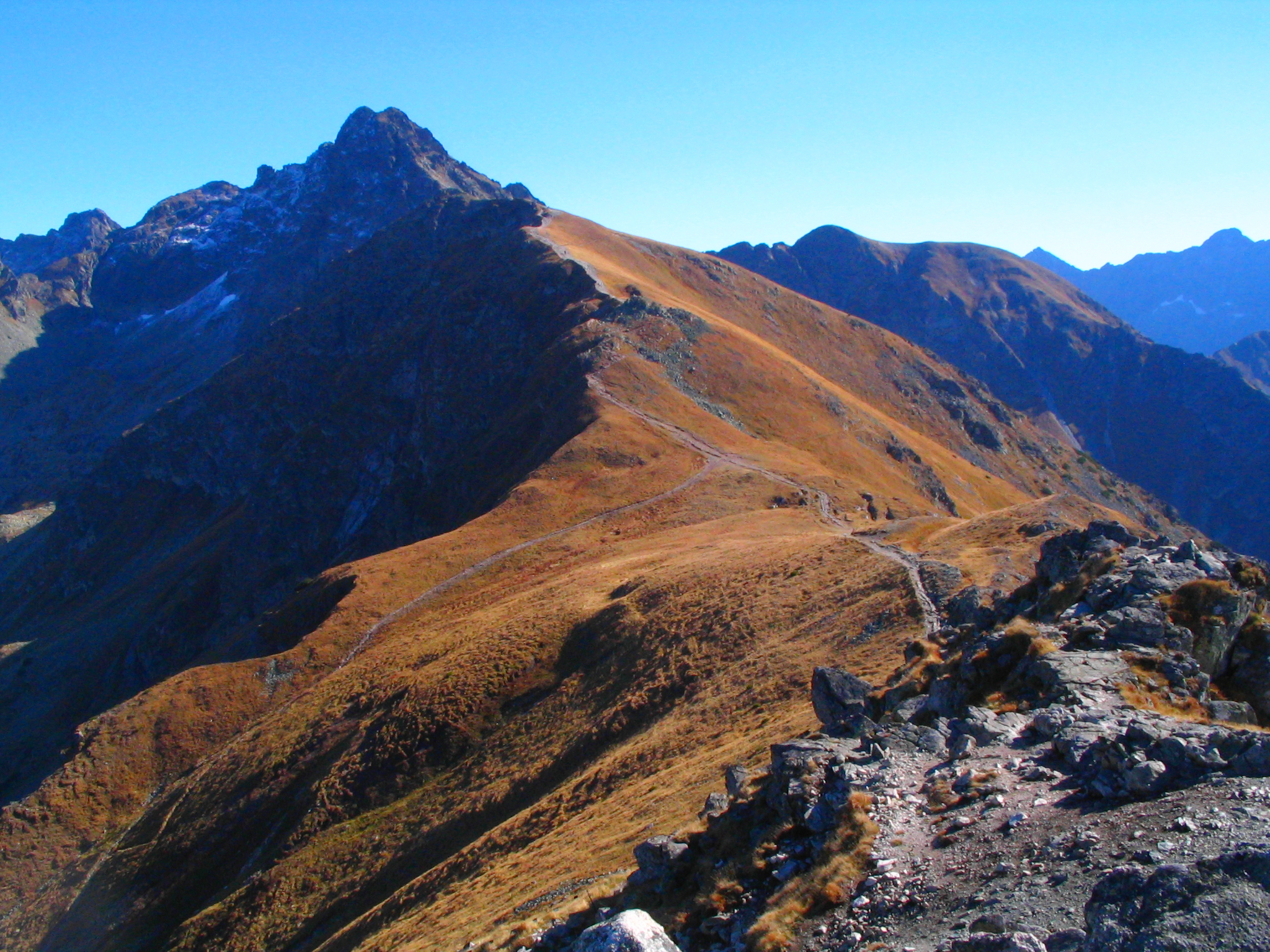 Kuźnice-Kasprowy Wierch-Beskid-Liliowe-Hala Gąsienicowa-Boczań-Kuźnice 12